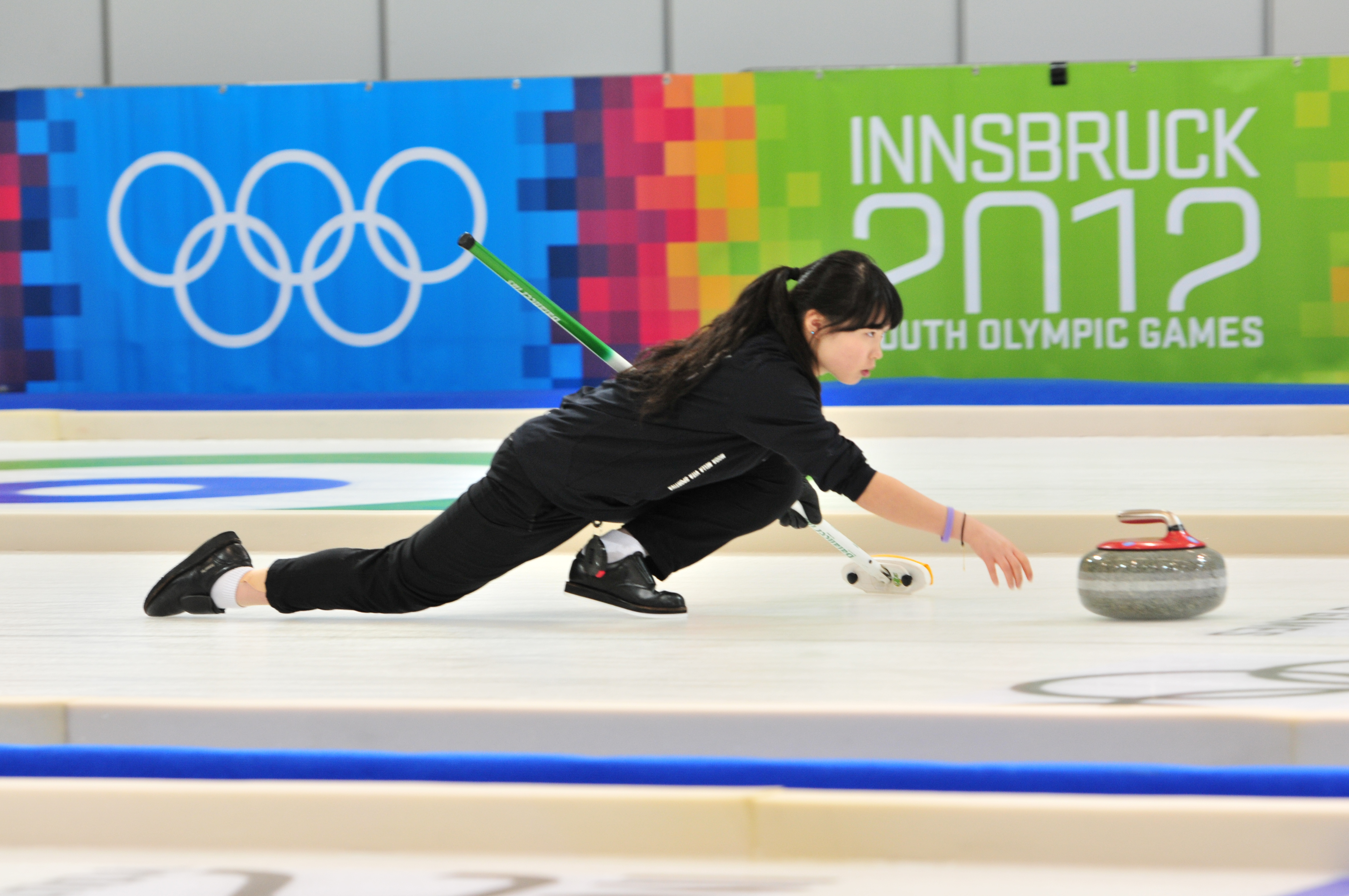 1. Jugendolympiade 2012 Innsbruck Erste Olympische Jugend- Winterspiele 201213. bis 22. Jänner in Innsbruck Dieses Foto wurde durch die Unterstützung von Wikimedia Österreich und die Twoonix Software GmbH ermöglicht.